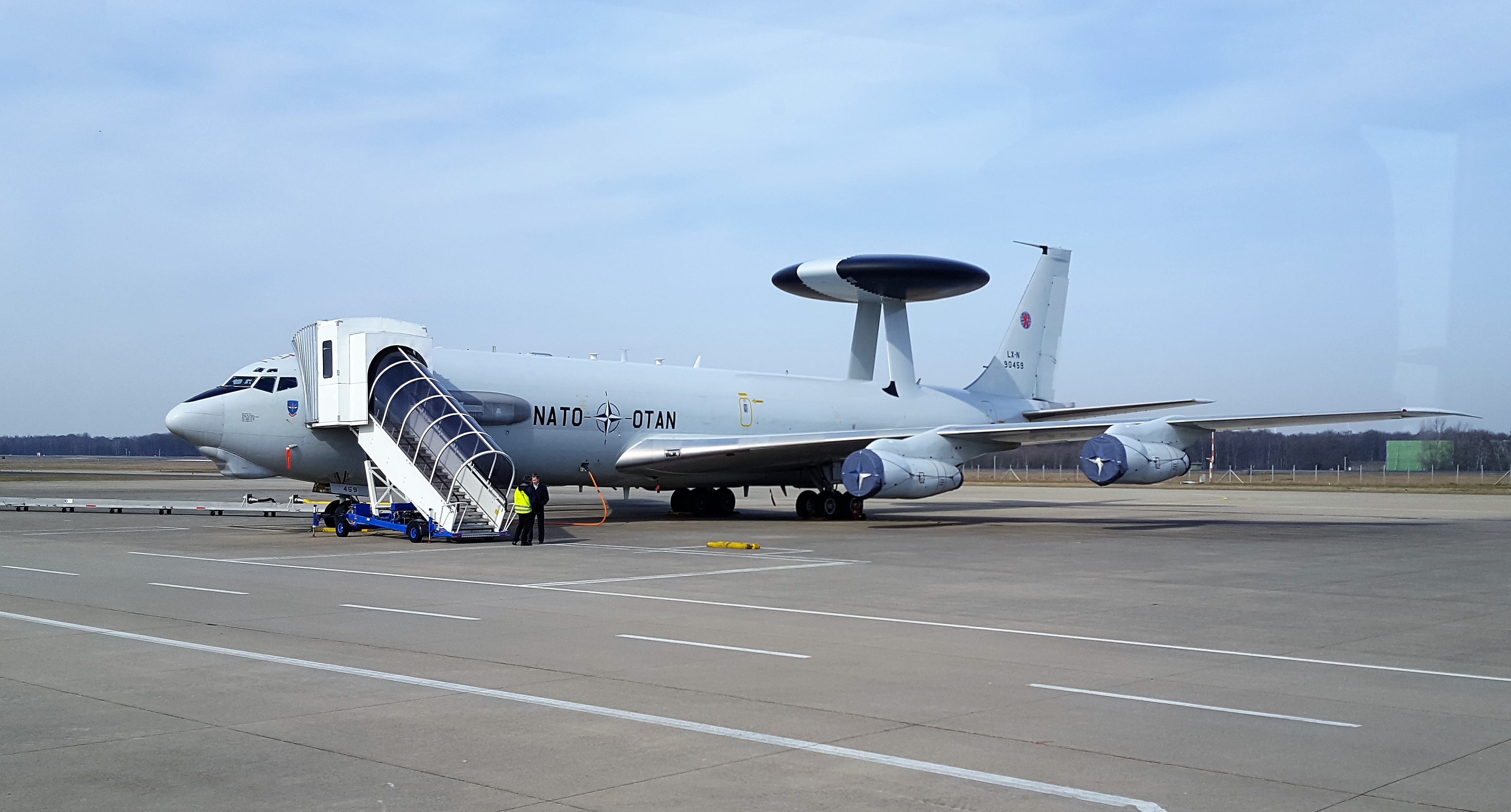 LX-N90459 AWACS Boeing E-3 in Geilenkirchen